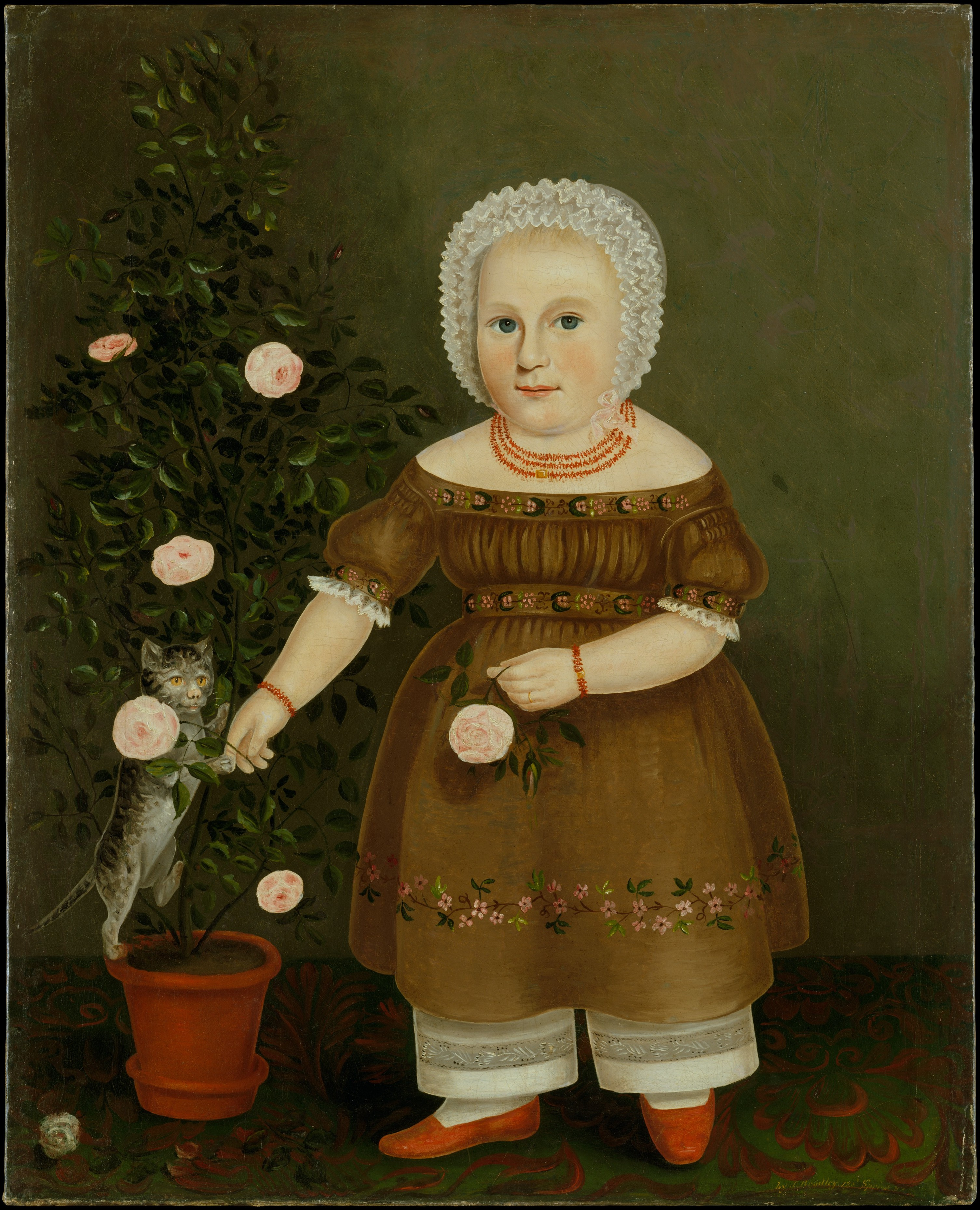 Painting; ; Paintings